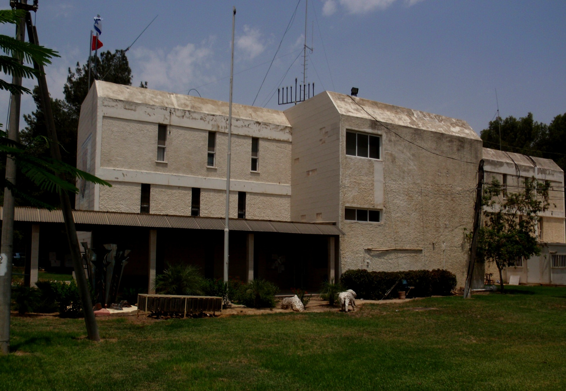 מרחבים בניין המועצה מהצד